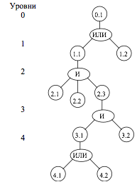 Пример И-ИЛИ-дерева